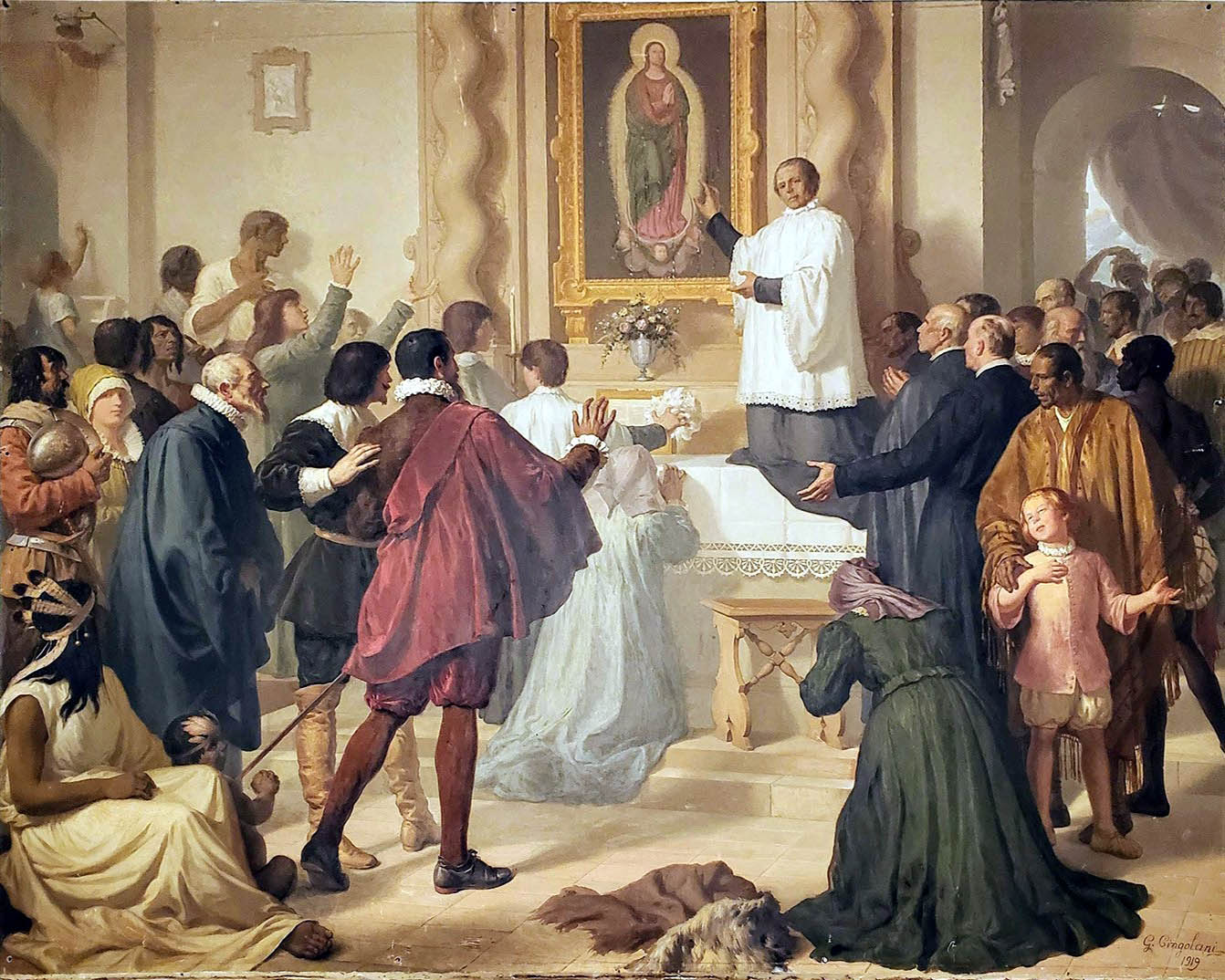 Pintura de Cingolani en Santa Fe.